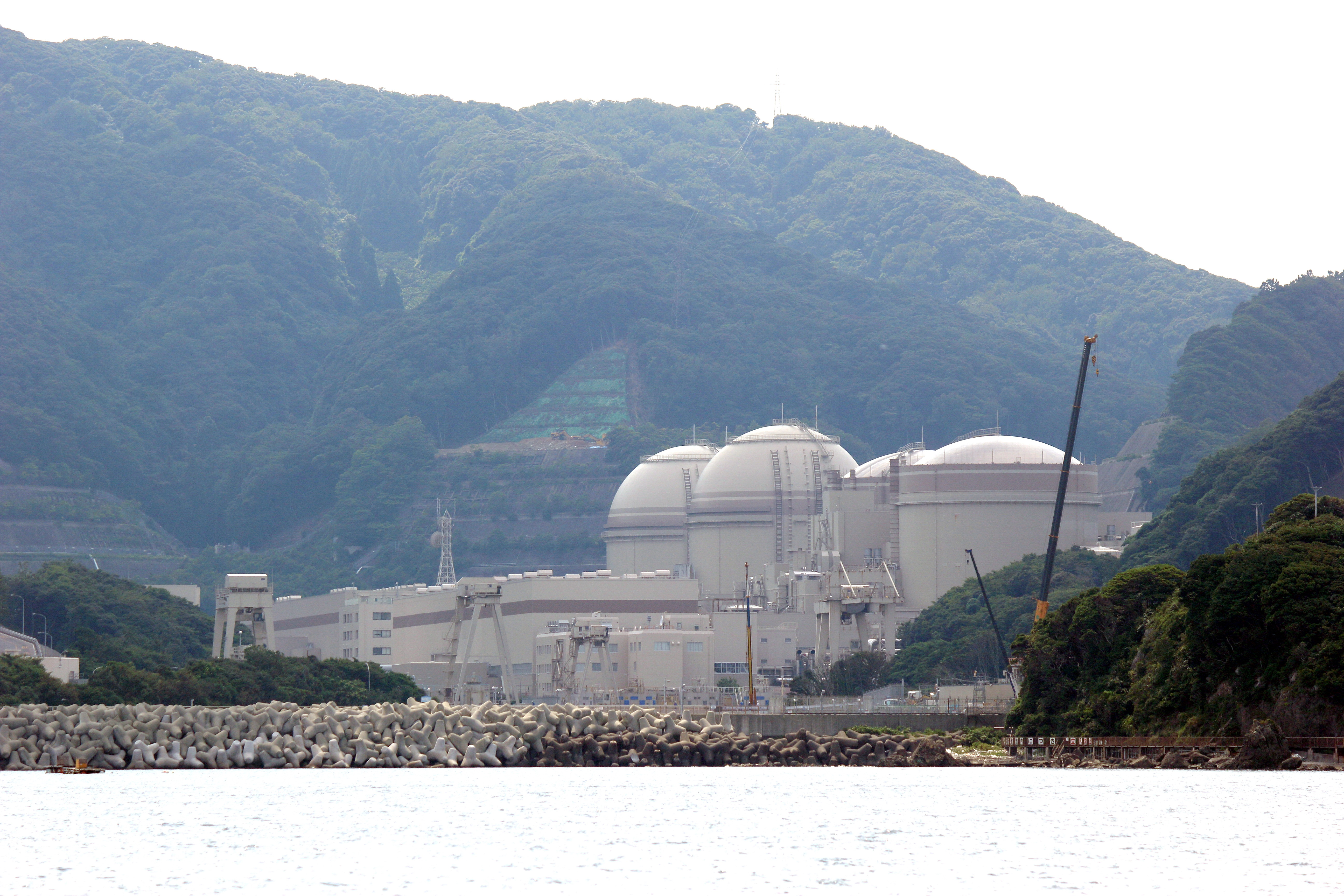 海上より撮影の大飯発電所